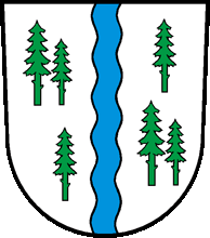 Wappen von Neckertal Kanton St.Gallen Schweiz